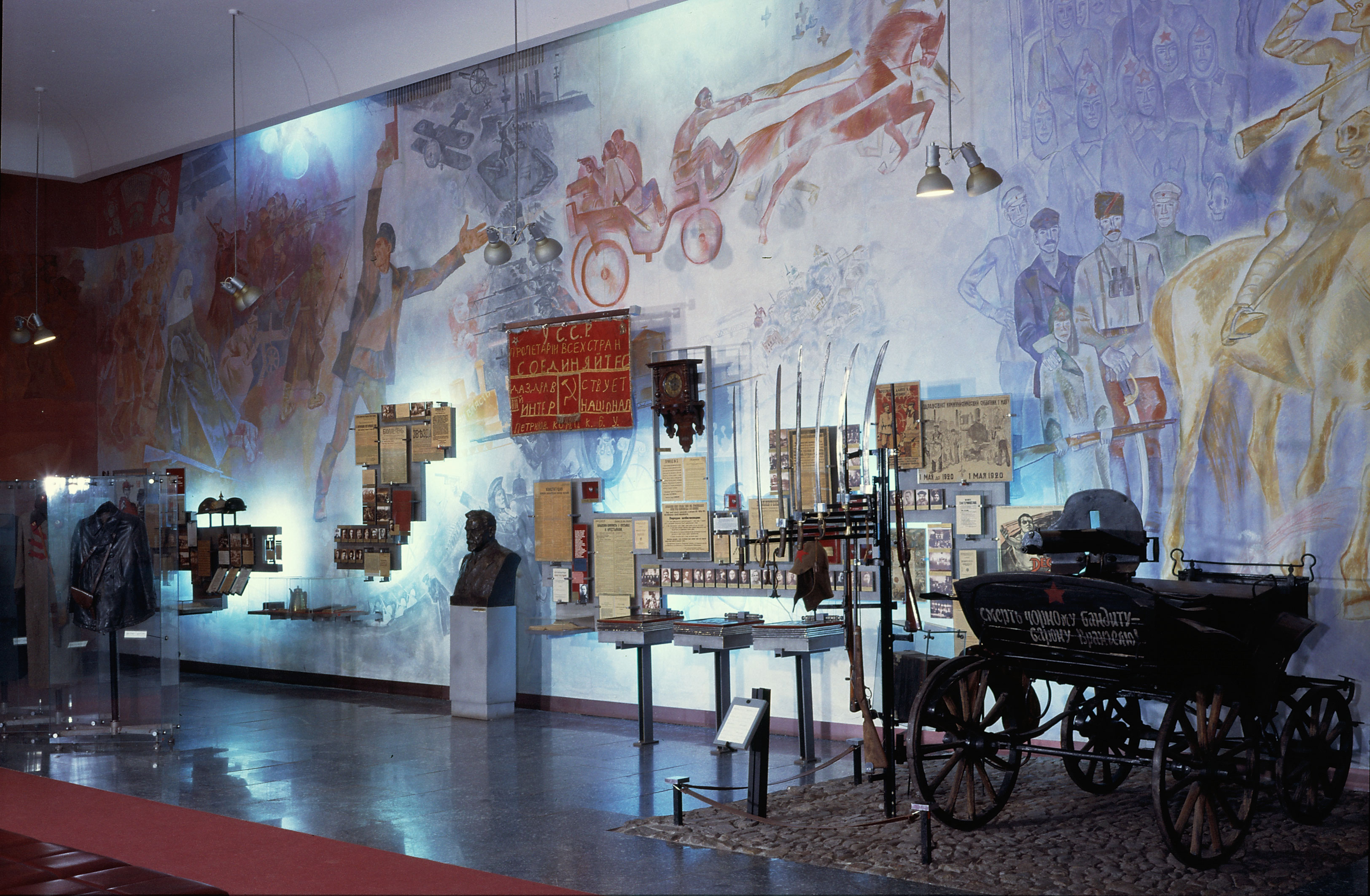 Зала №5. Українська революція та Катеринославщина у 1917-1922 років